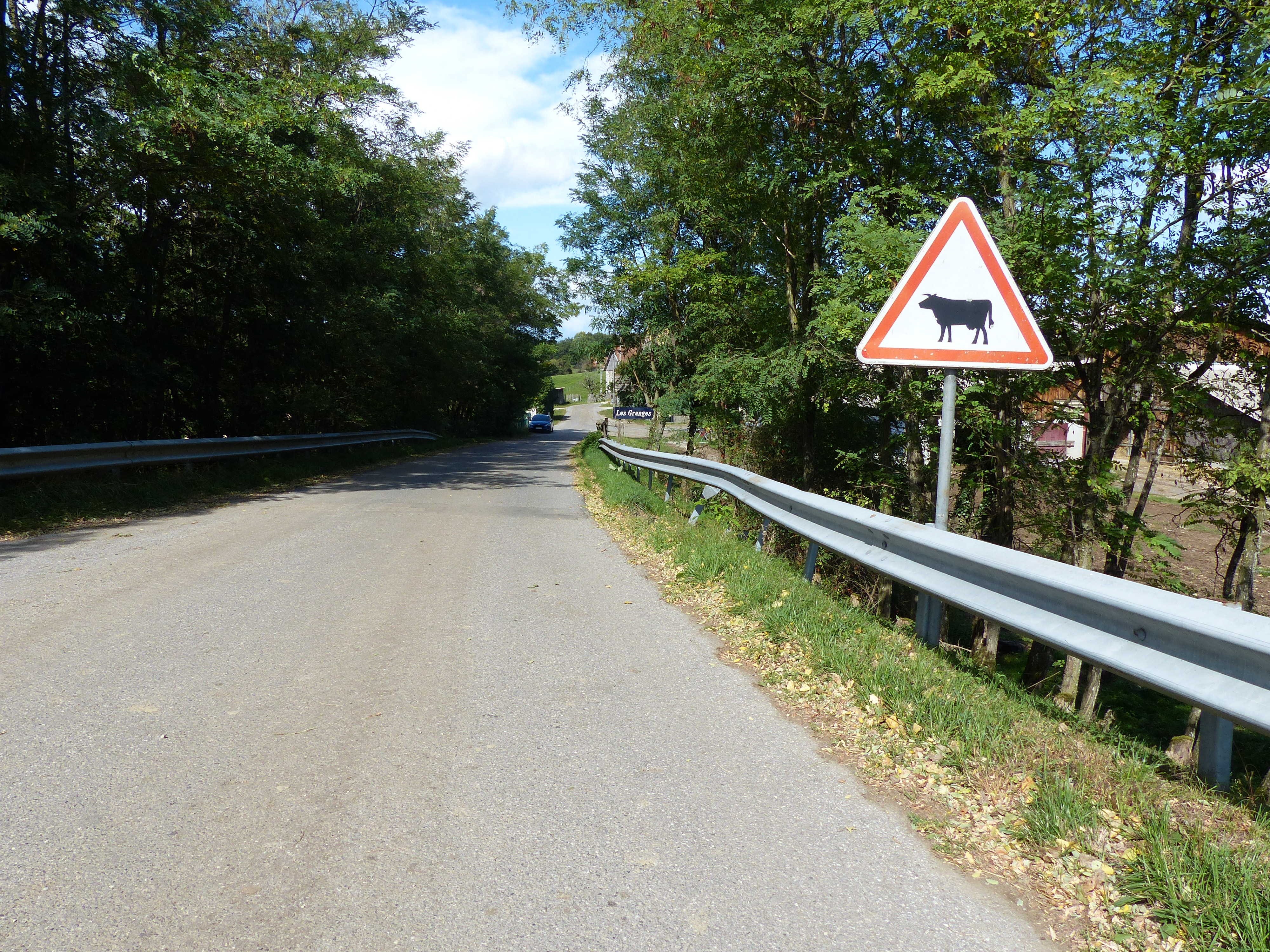 Panneau A15a1 attention aux bovins, route des Granges, Arenthon, Haute-Savoie, France.